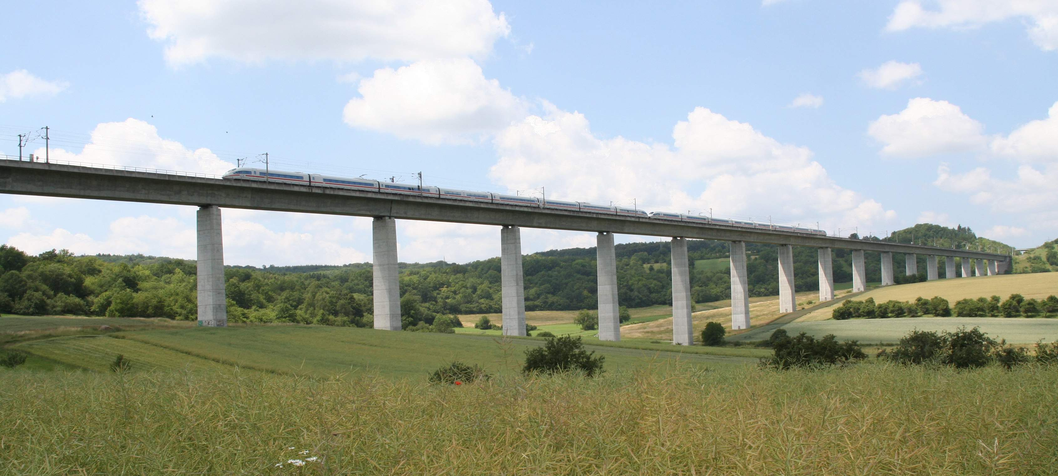 Bartelsgrabentalbrücke bei Zellingen am Main